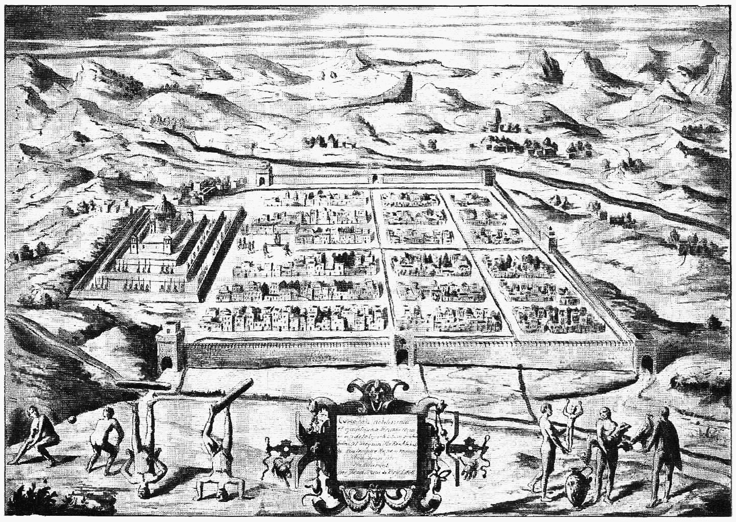 vue de Cuzco d’après un ouvrage du seizième siècle.